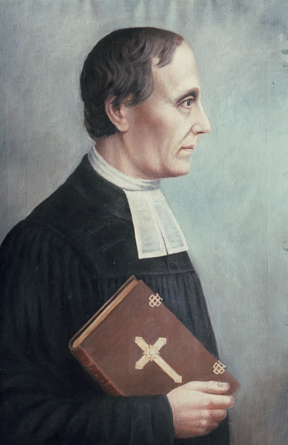 Portrait Ludwig Harms, auch: Louis Harms. Gründer u.a. der Hermannsburger Mission